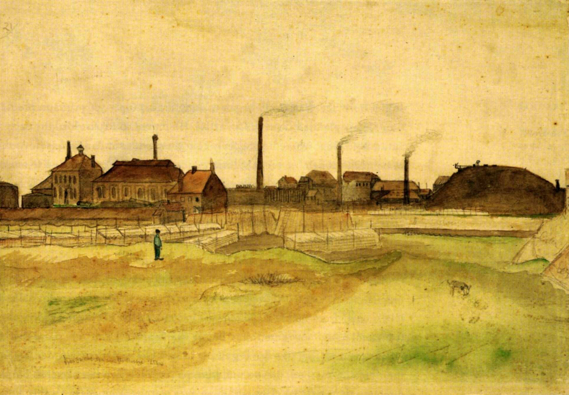 Vincent van Gogh - Aout 1879 - Mine de Charbon dans le Borinage - Cuesmes- Wasmes